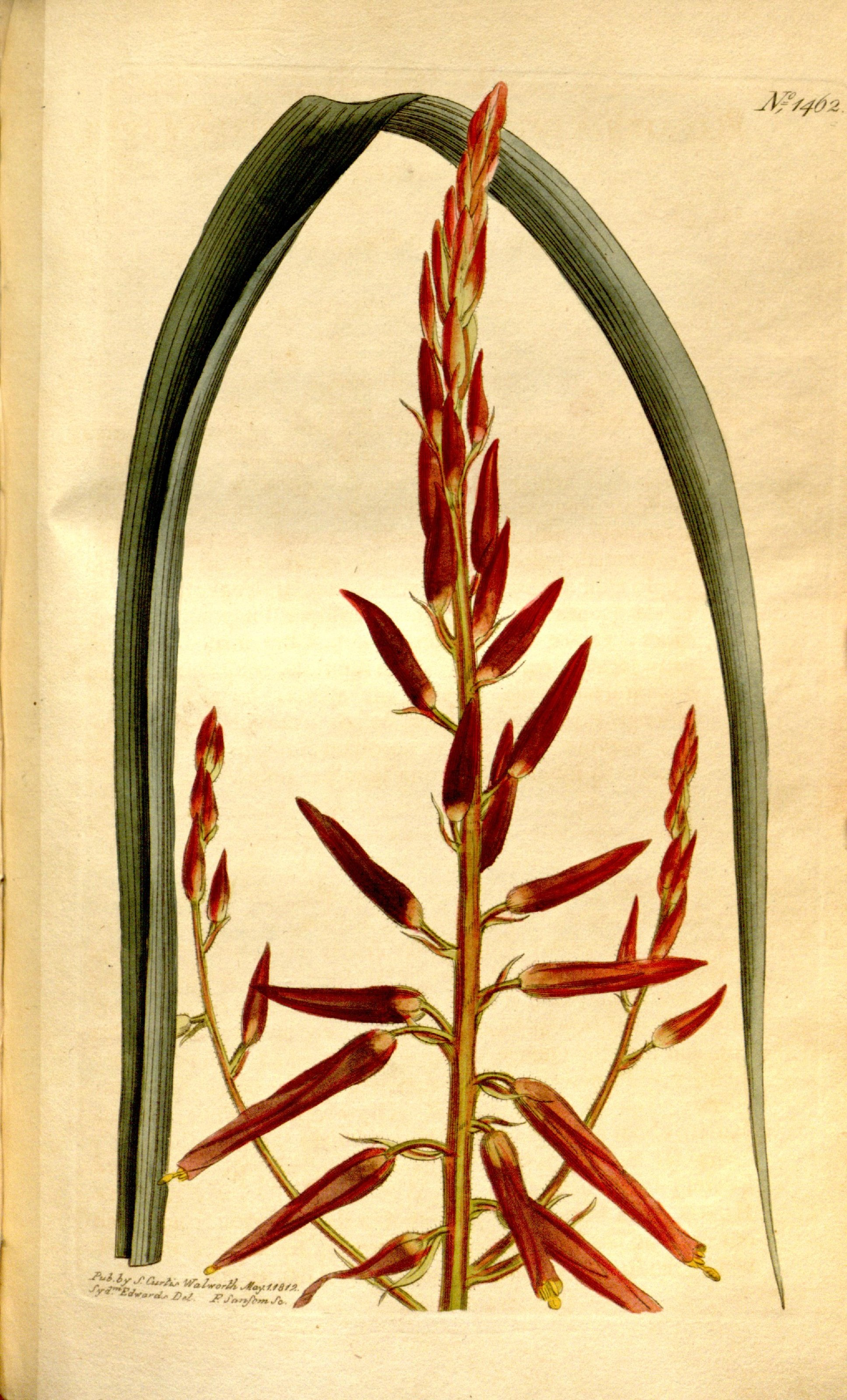 /. //" A"*lrJM-A